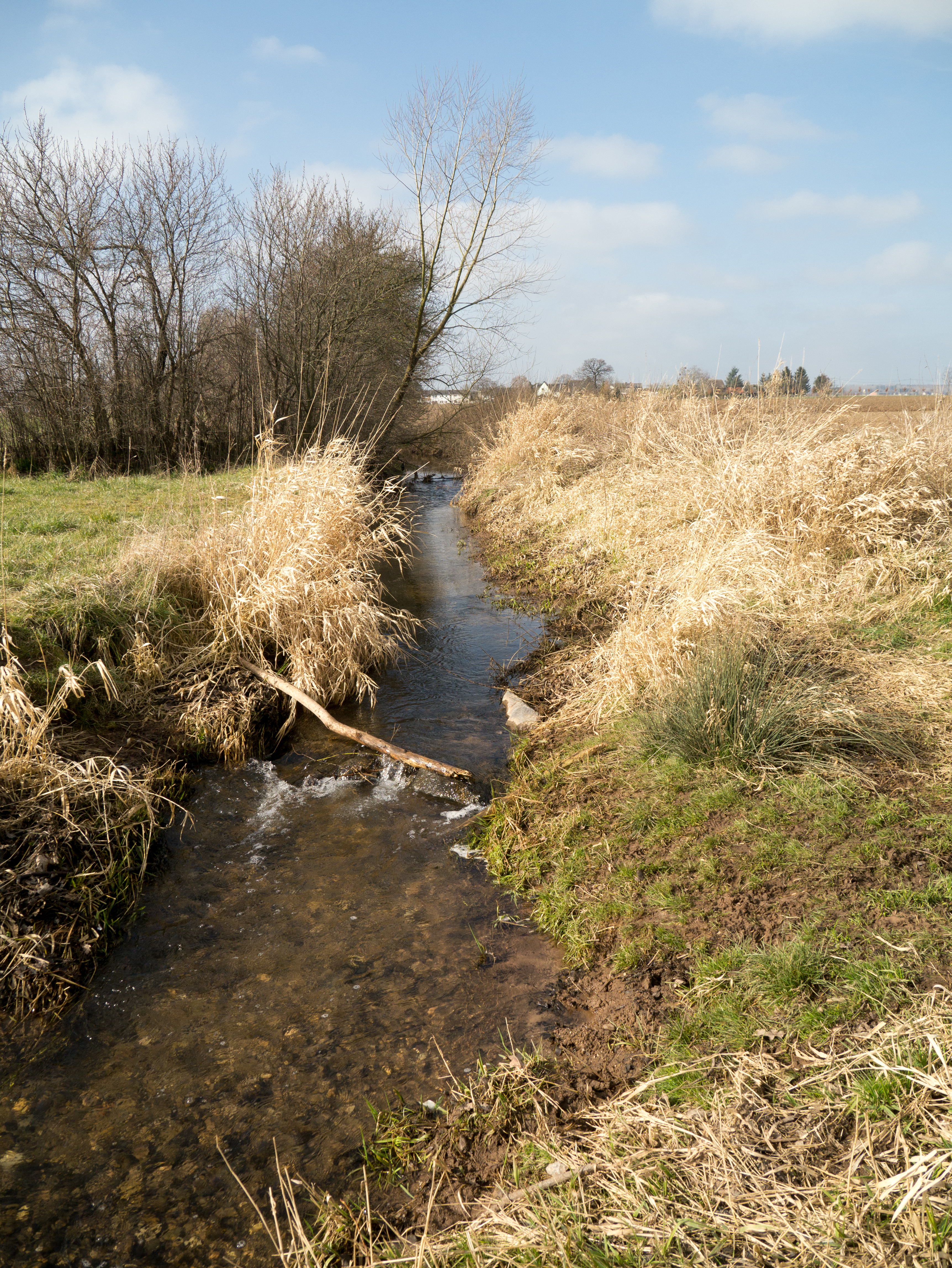 Vlattener Bach zwischen Floren und Lövenich (schutzwürdiges Biotop BK 5305-058) im Naturschutzgebiet „Aue des Vlattener Bachs zwischen Merzenich und Lövenich“ (NSG EU-173) in Zülpich